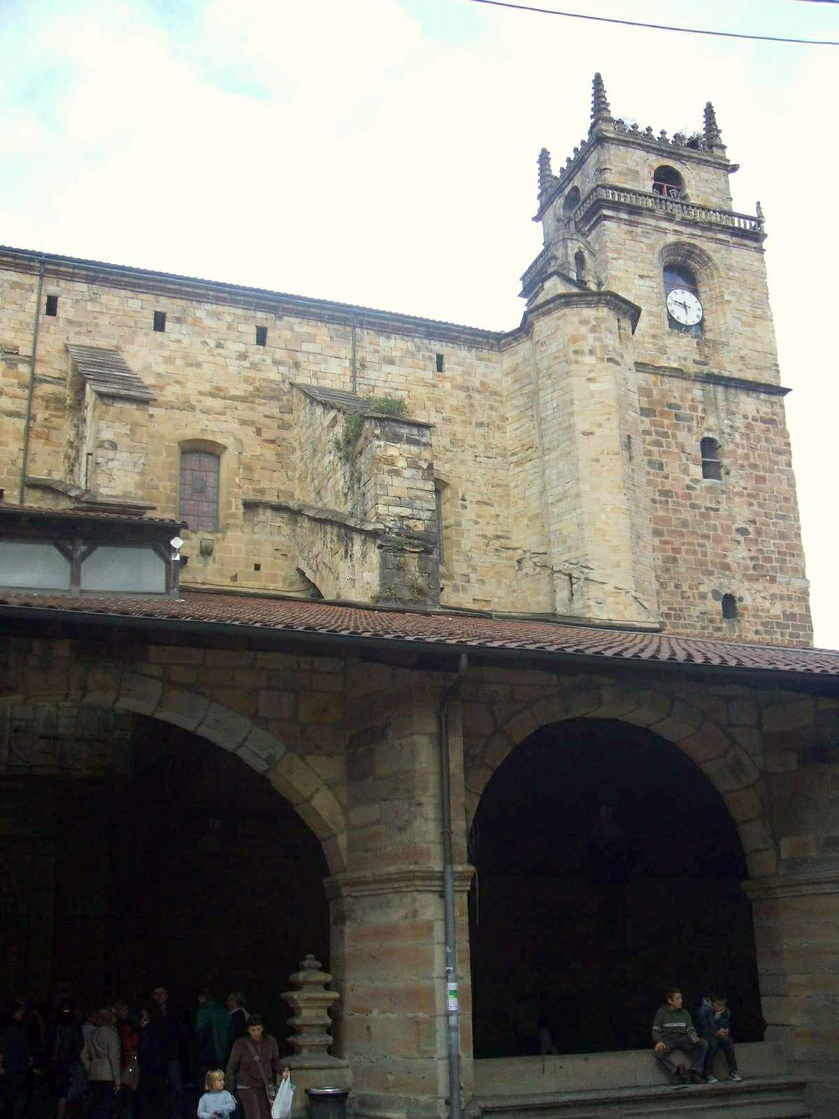 Iglesia de Santa María de Uribarri, Durango (Bizkaia)